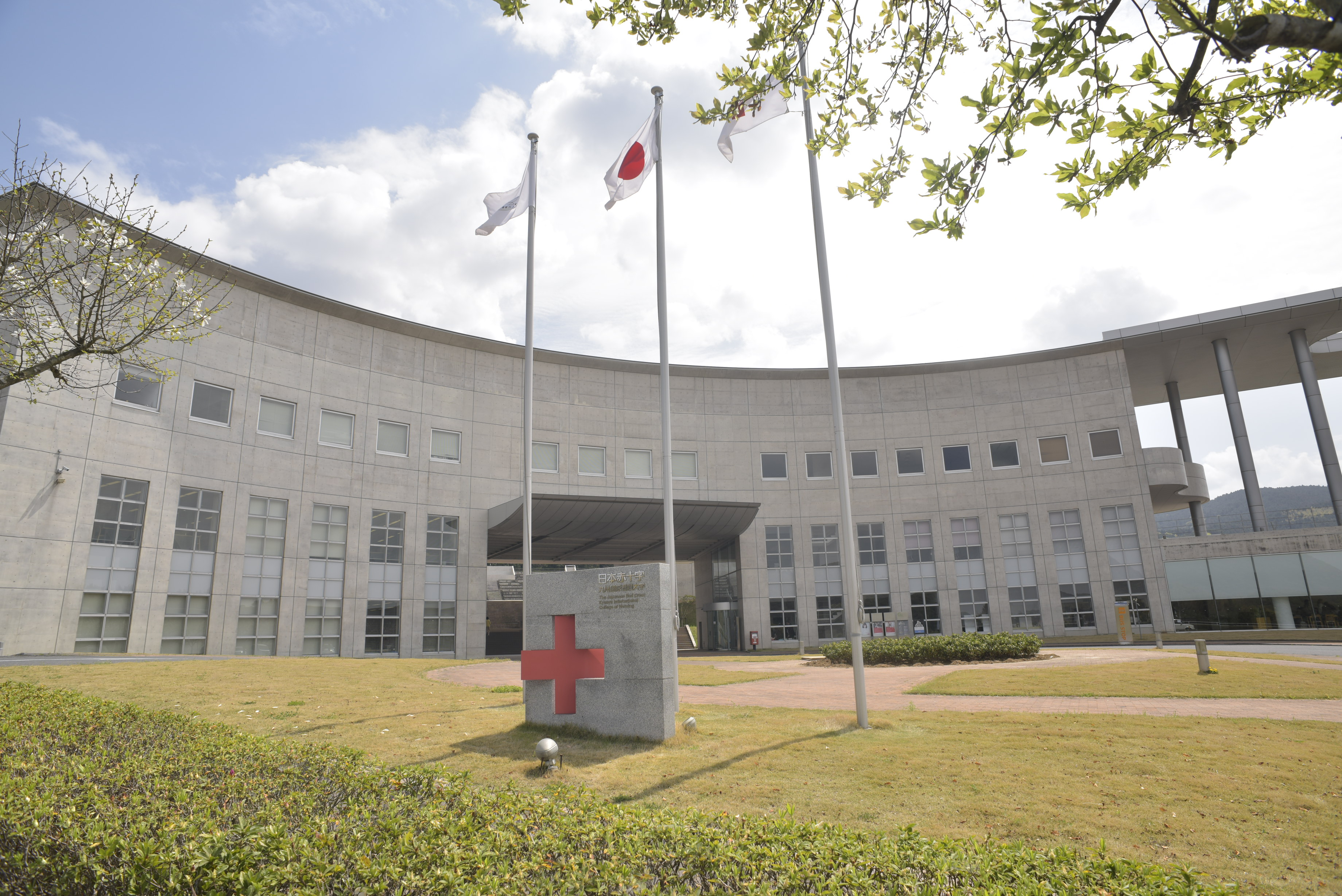 大学正面